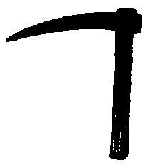 Kőmüves csákány